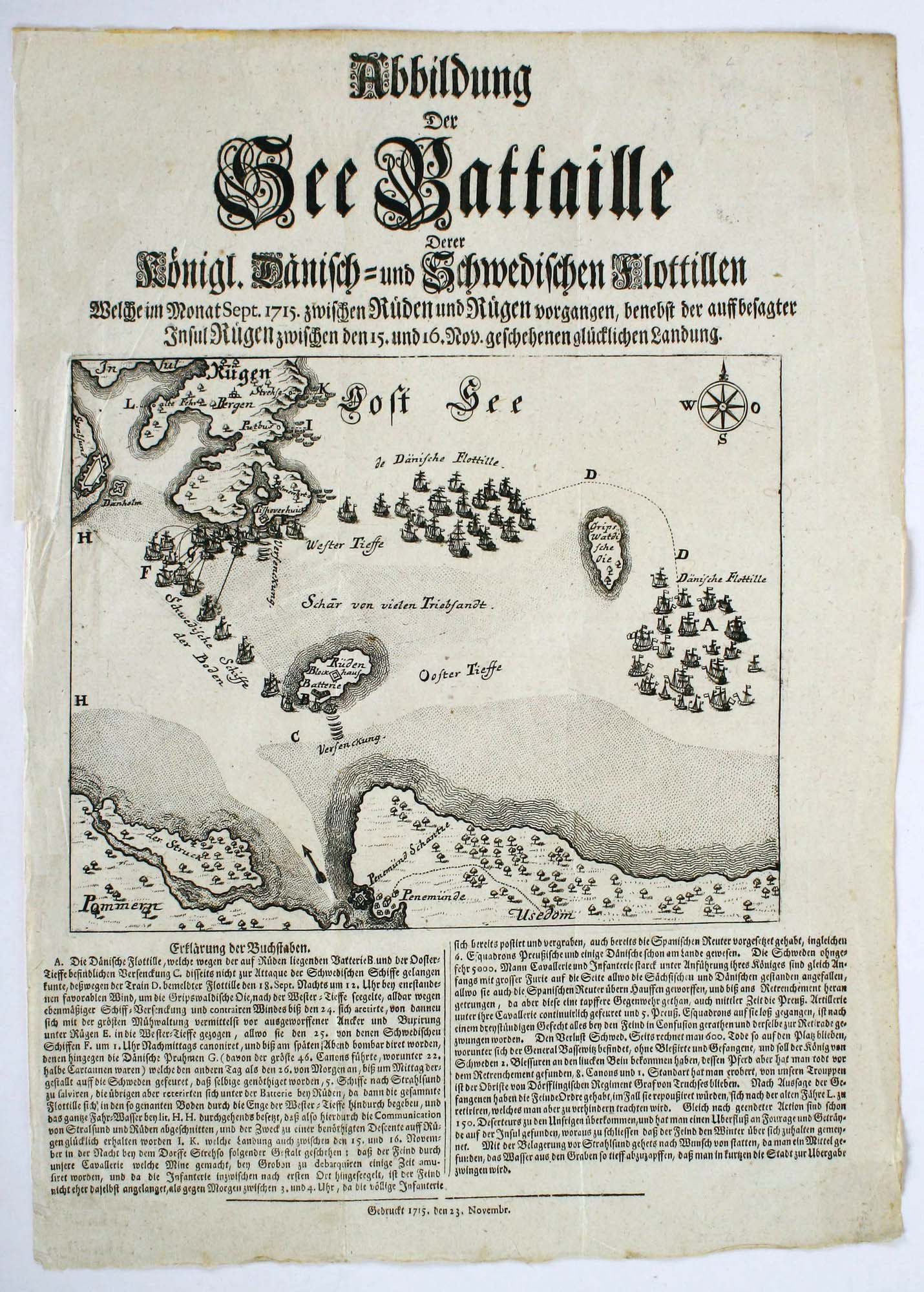 Abbildung Der See Battaille Derer Königl. Dänisch- und Schwedischen Flottillen Welche im Monat Sept. 1715 zwischen Rüden und Rügen vorgangen, benebst der auffbesagter Jnsul Rügen zwischen den 15. und 16. Nov. geschehenen glücklichen Landung. Seltene Schilderung der am 25. IX. 1715 vor Rügen abgehaltenen Seeschlacht, die den Durchbruch der dänischen Flottenverbände im Pommernfeldzug des Großen Nordischen Kriegs brachte. Im Anschluß konnte die bislang von den Schweden gehaltene Insel durch die preußischen, dänischen und sächsischen Alliierten erobert werden. Die Karte zeigt den Rügenschen und Greifswalder Bodden zwischen Stralsund, Greifswalder Oie und Peenemünde.